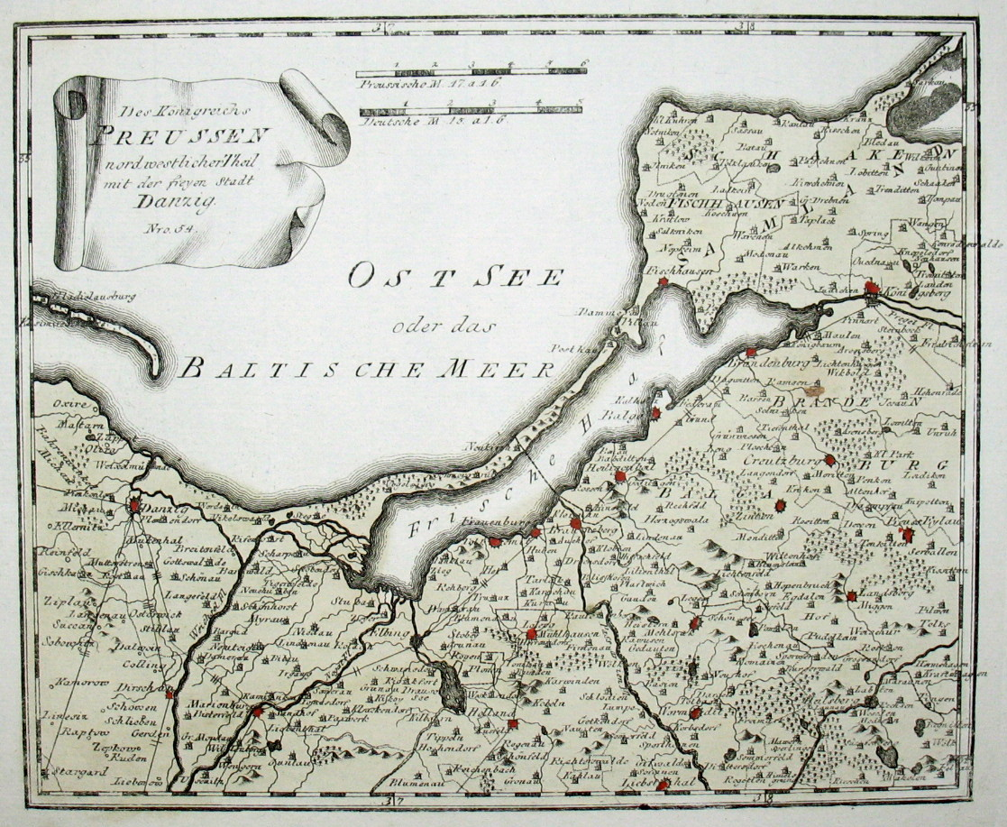 Des Königreichs Preussen nordwestlicher Theil mit der freyen Stadt Danzig. Nro. 54. Kupferstich. 27 × 22 cm